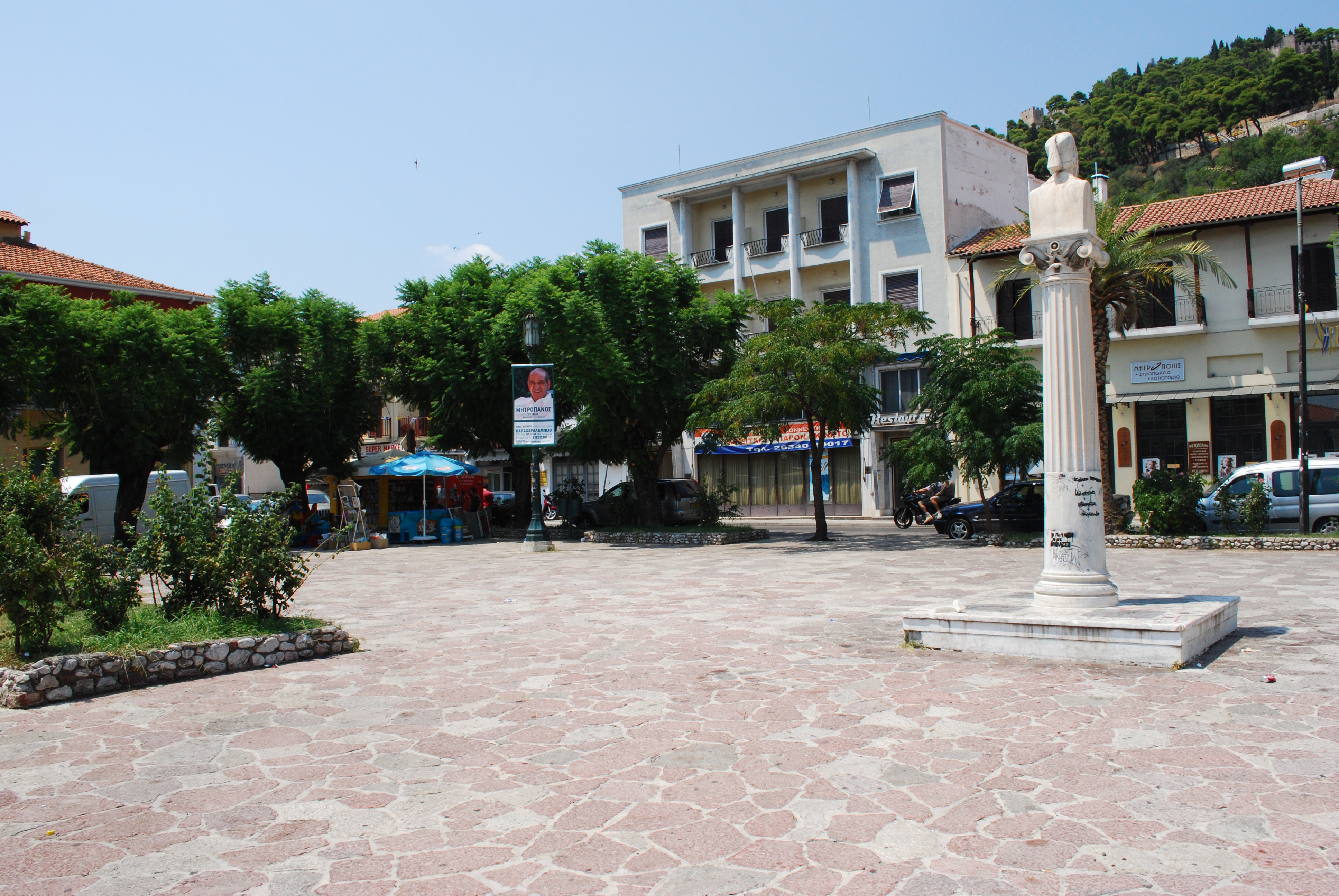 Vue de la place de Nafpaktos.